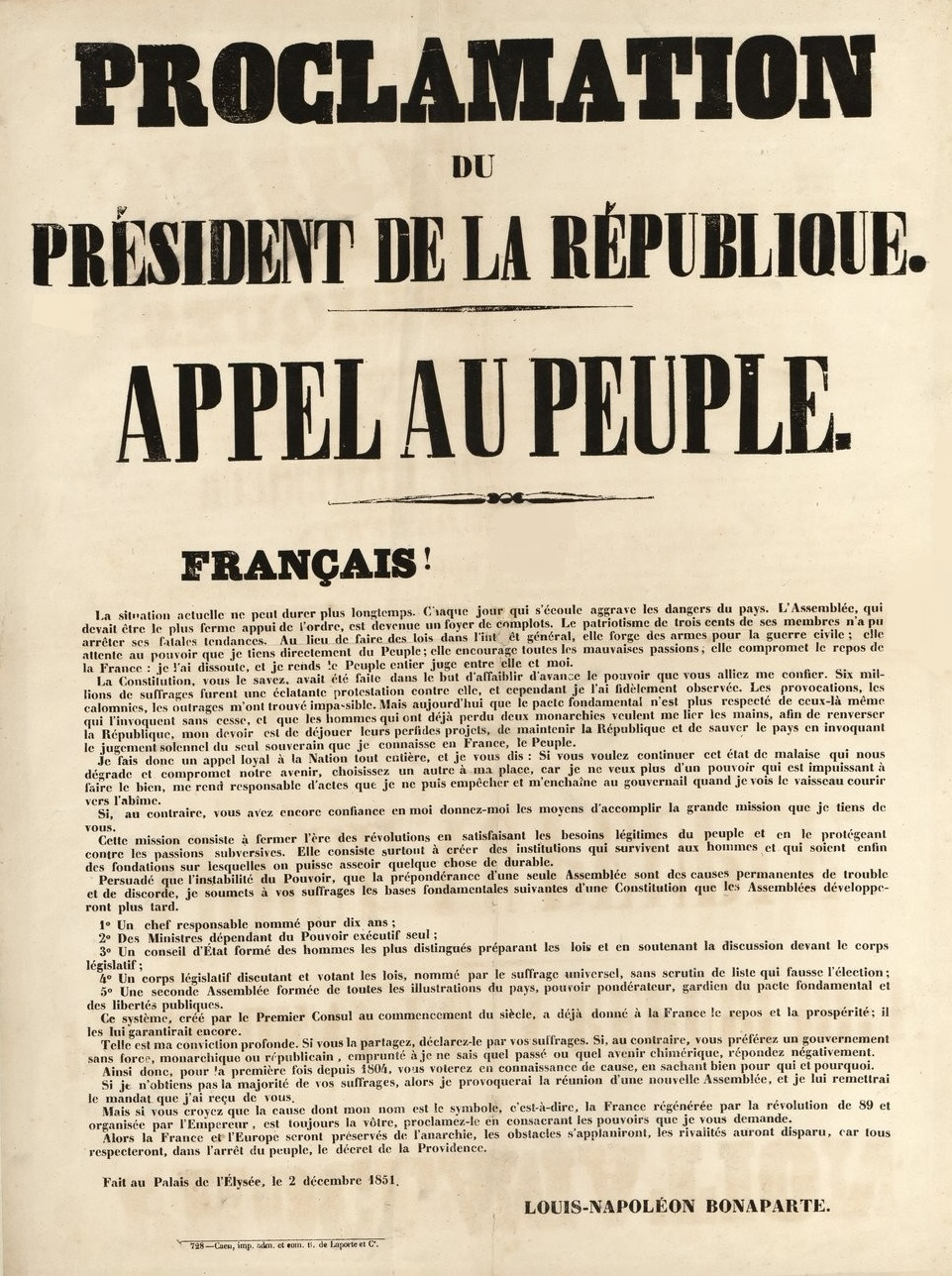 Coup d'État du 2 décembre 1851 - Proclamation du président de la République - Appel au peuple. Nicole Villa, Denise Dommel et Jacques Thirion, Collection De Vinck : inventaire analytique. Un siècle d'histoire de France par l'estampe, 1770-1871, tome 7 : La Révolution de 1848 et la Deuxième République, Bibliothèque nationale, Département des estampes, 1955, p. 772, lire en ligne.